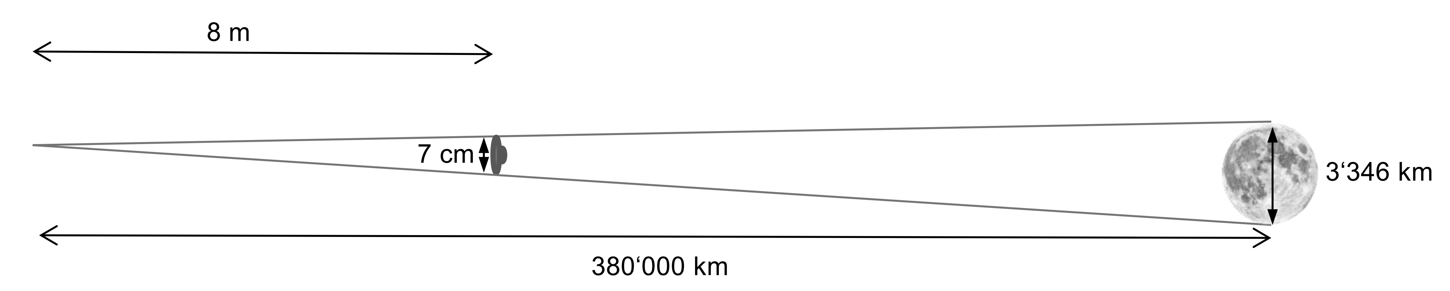 Bestimmung der Mondgröße aus der Mondentfernung über die Strajhlensätze, siehe Der Mond und seine Bewegung; aus einem Lehrstückentwurf der Lehrkunstdidaktik